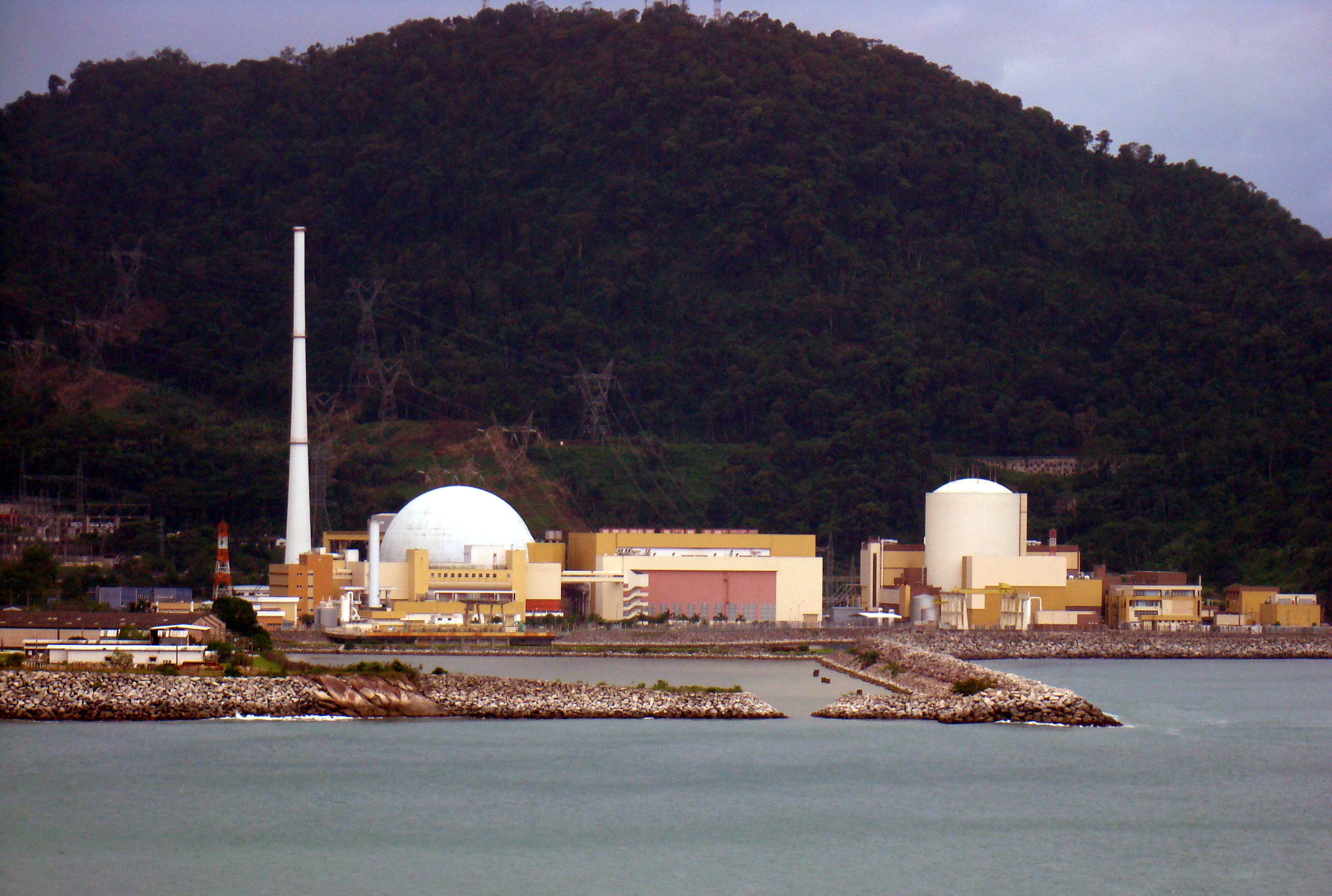 Vista da Central Nuclear Almirante Álvaro Alberto em Angra dos Reis, Rio de Janeiro, Brasil.